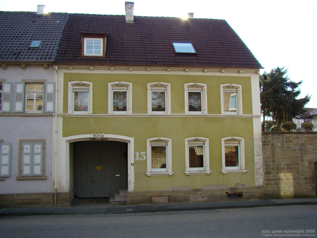 Historisches Gebäude Kaiserstr. 13 in Eppingen